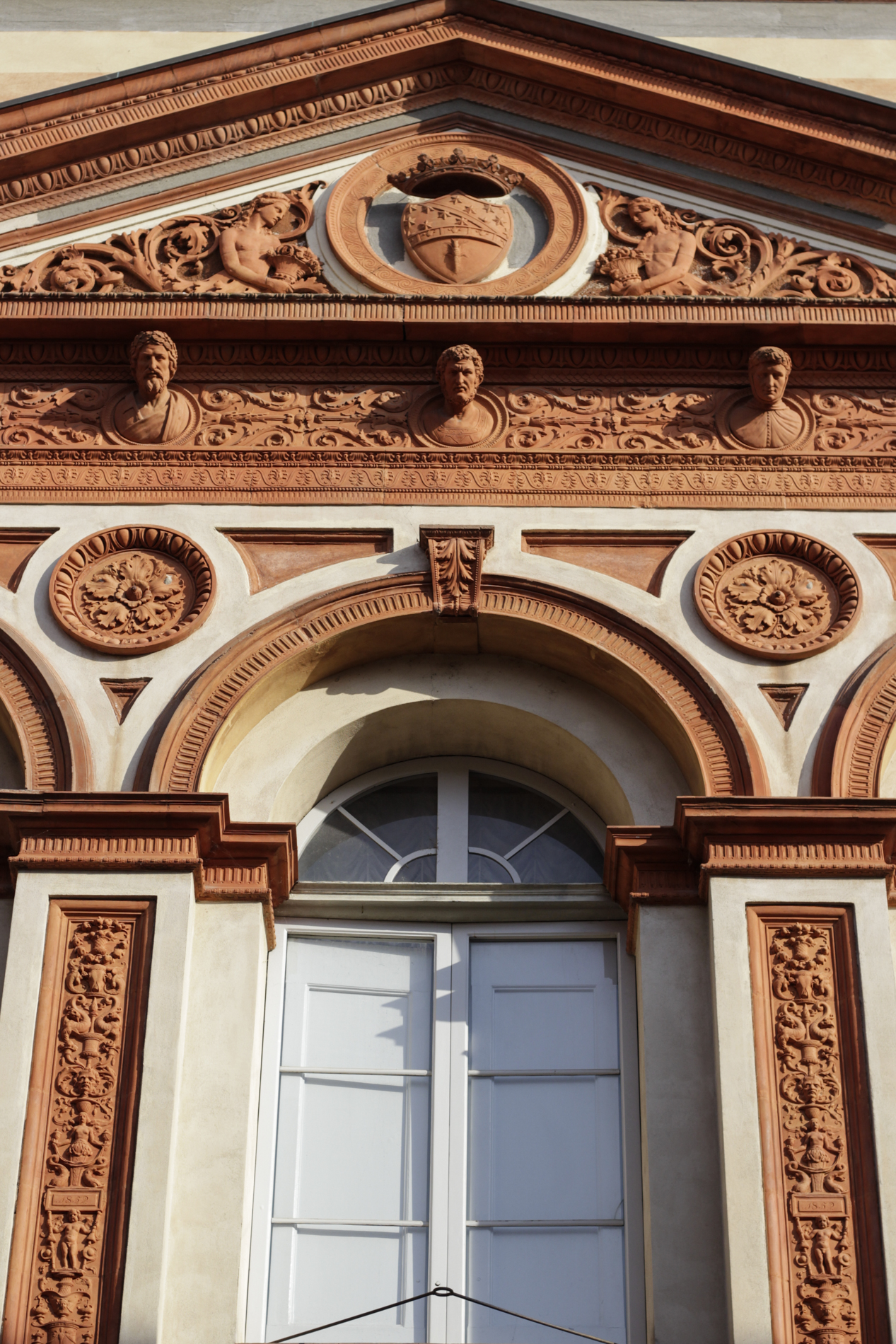 Particolare della facciata del Teatro comunale G.Burgatti di Cento. This is a photo of a monument which is part of cultural heritage of Italy.